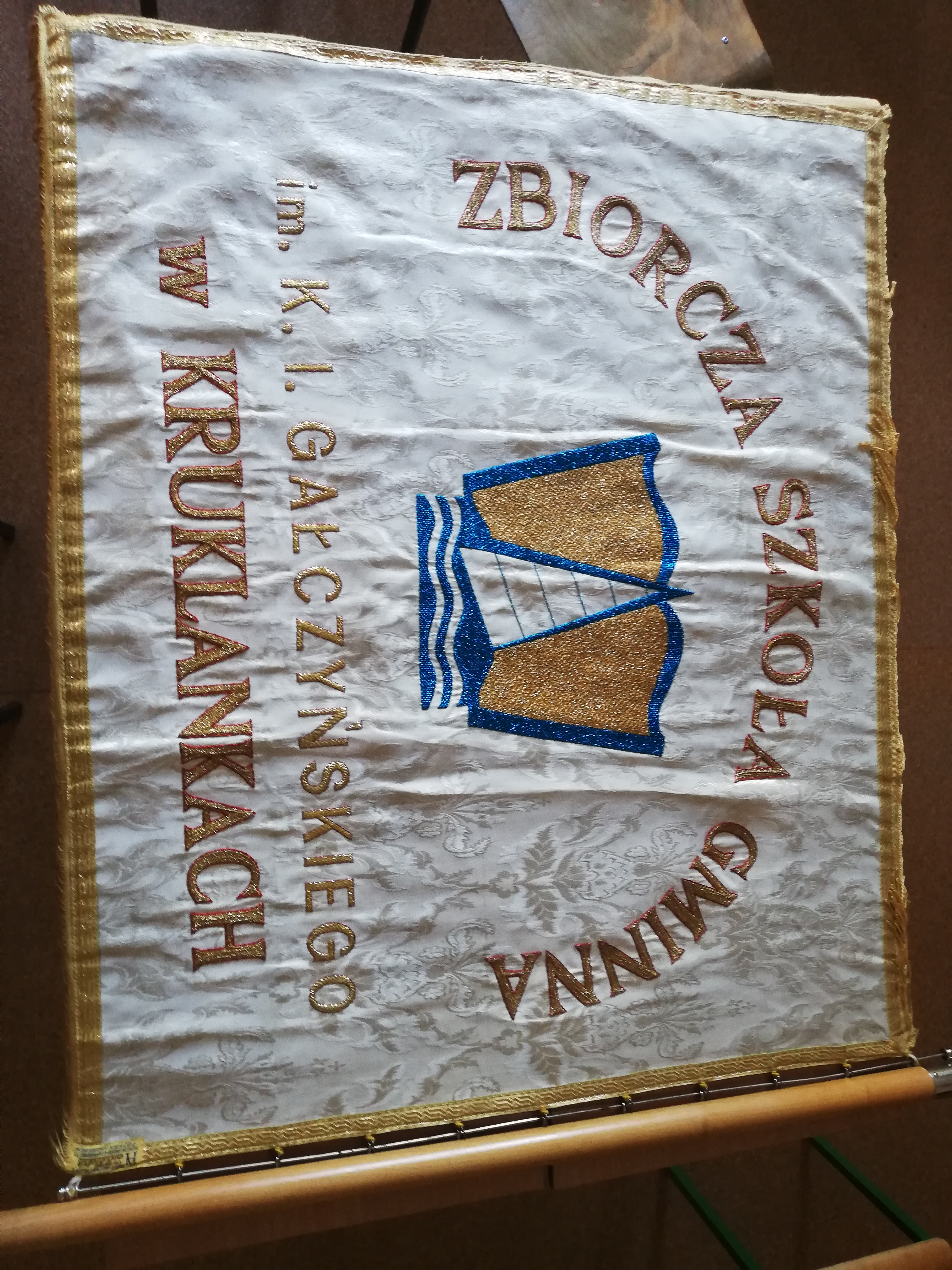 Stary Sztandar Szkoły Podatawowej w Kruklankach